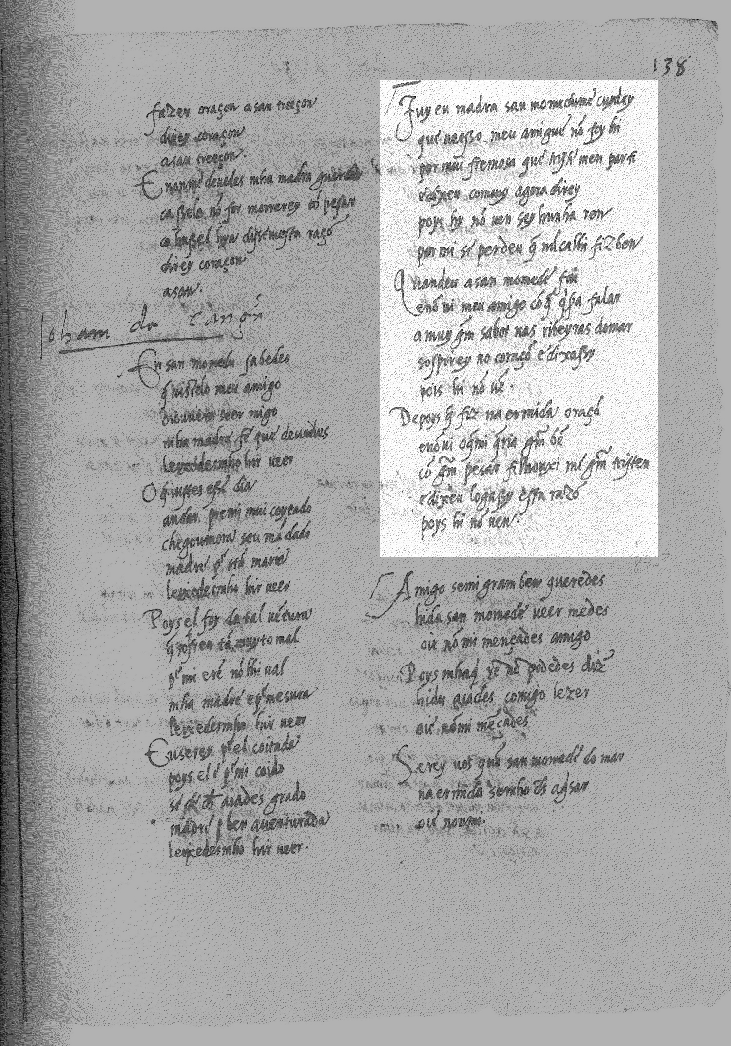 Cancioneiro da Vaticana - V 874